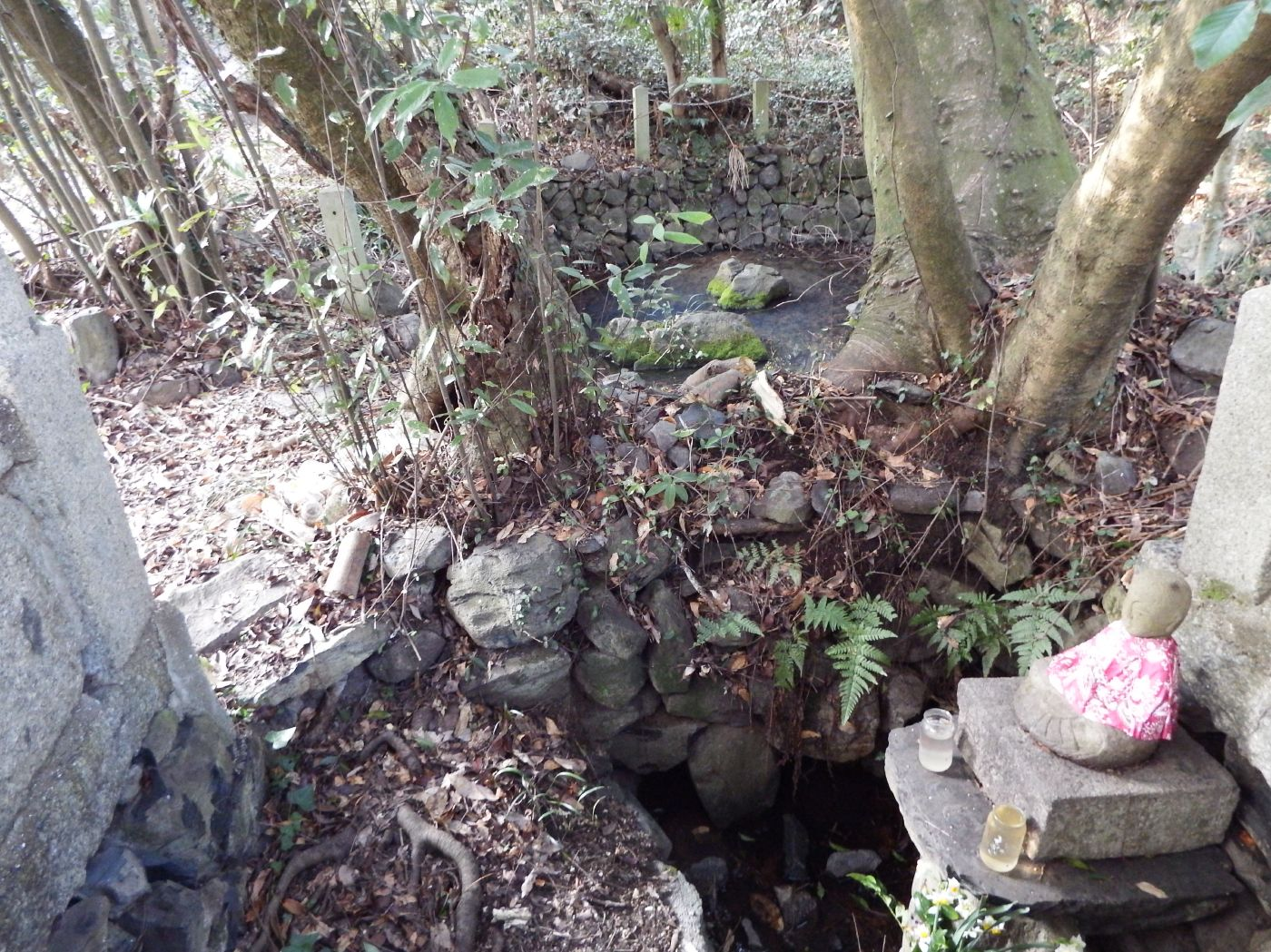 金山薬師の池